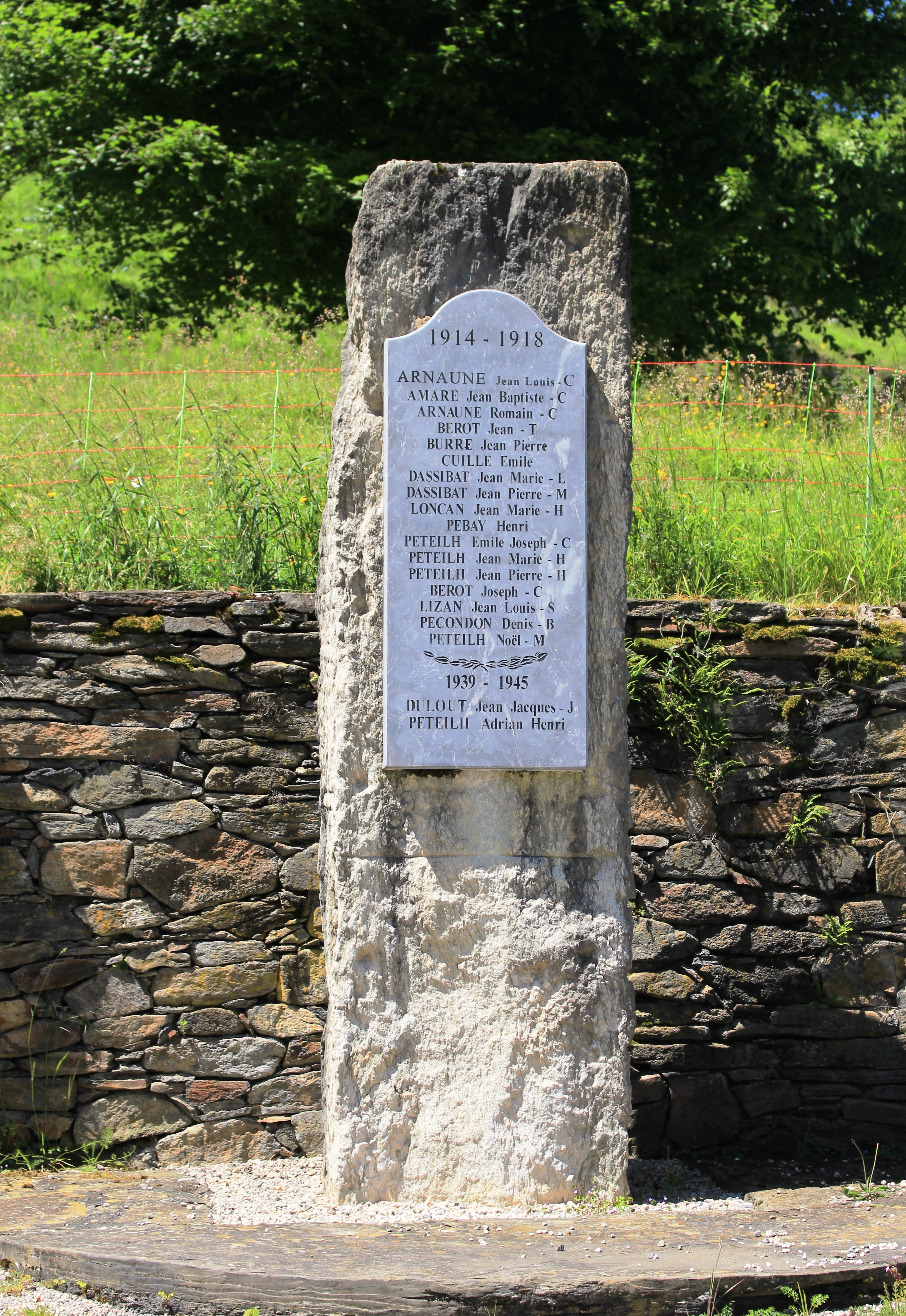 Monument aux morts de Beaudéan (Hautes-Pyrénées)